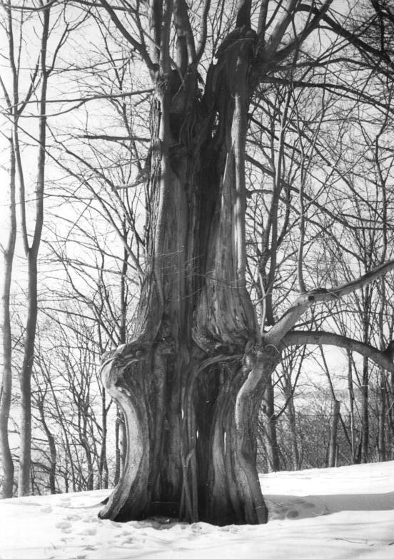 Bad Liebenstein, Hohllinde Zentralbild TBD-Wehse 11 Mot.8.3.1955 - 2805- Handwerkererholungs- und Schulungsheim Schloß Altenstein-Thür. im Winter Auch im Winter können sich Handwerker in dem ehemaligen Herzogssitz Schloß Altenstein erholen. Einige Kilometer von Bad Liebenstein entfernt liegt in einem landschaftlich schönen Fleckchen dieses Erholungs- und Schulungsheim für Handwerker. Jahrhunderte alte Bäume zieren den Park des Handwerkererholungsheimat Schloß Altenstein. UBz: eine 400 Jahre alte Linde, das " Naturwunder" dieses Parkes. Sie nimmt nur noch Nahrung durch die Rinde aus dem Boden.